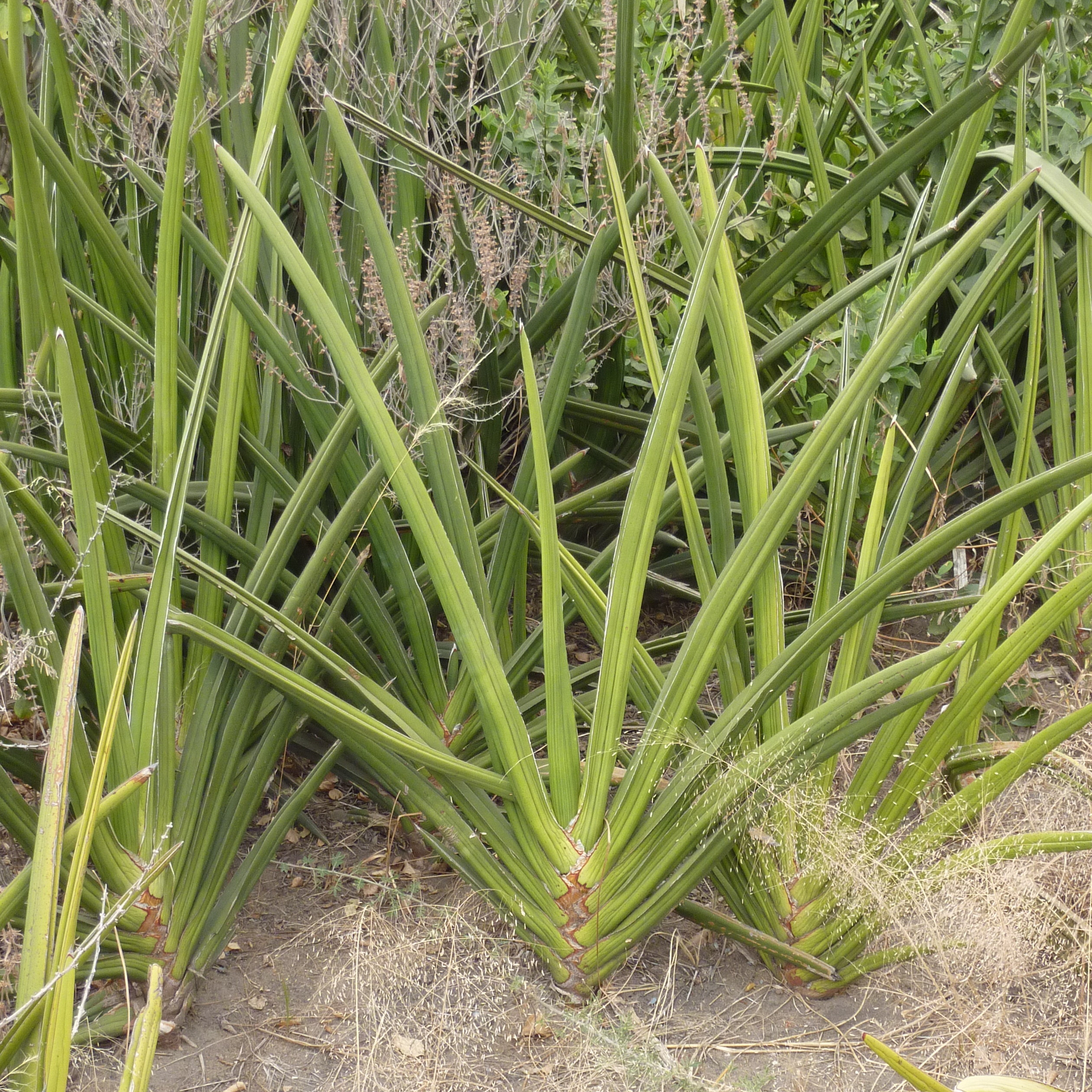 Sansevieria ehrenbergii in der Serengeti